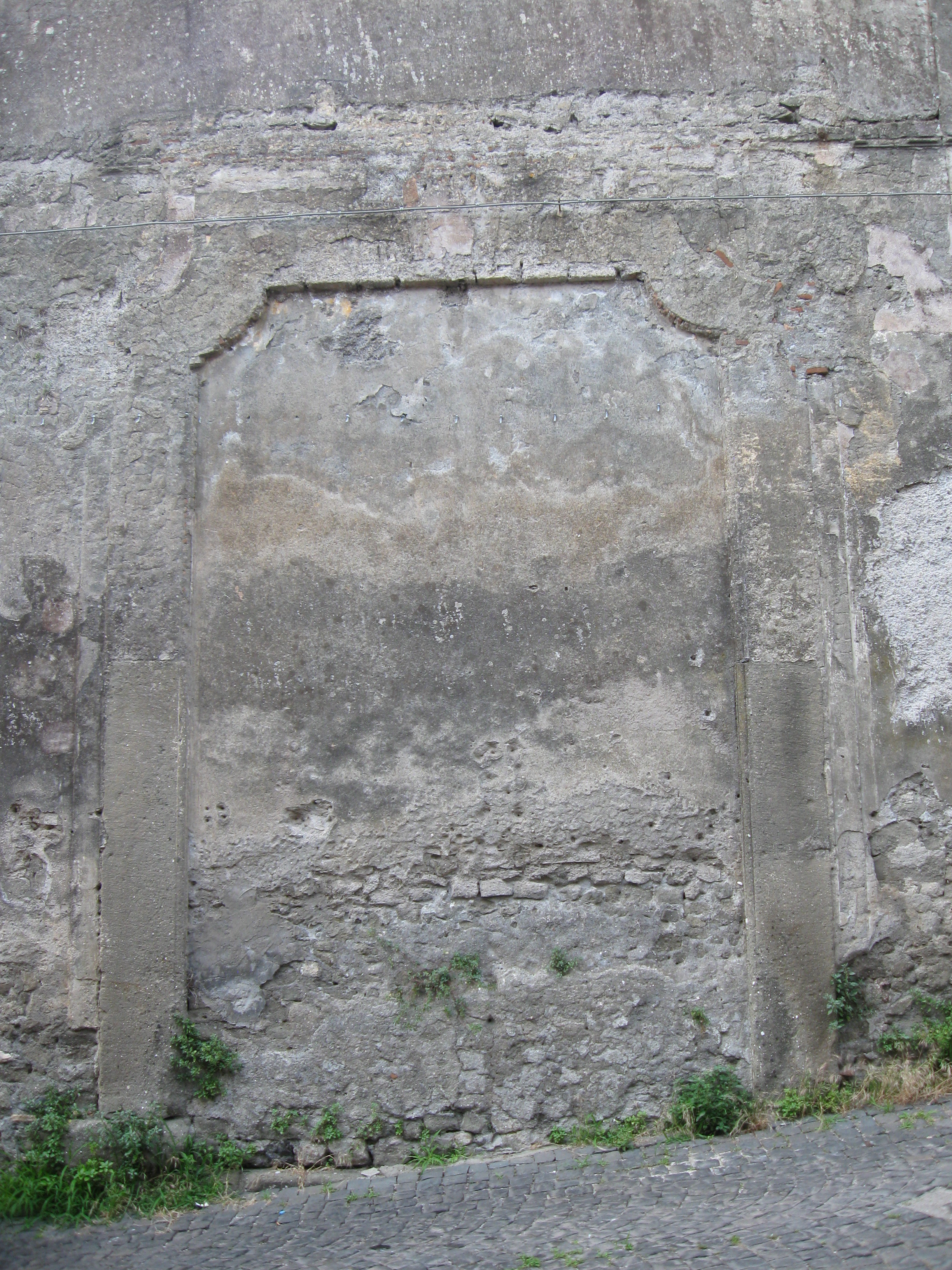 Palazzo Pamphilj ad Albano Laziale (RM): il portale "acciecato" su via San Gaspare del Bufalo